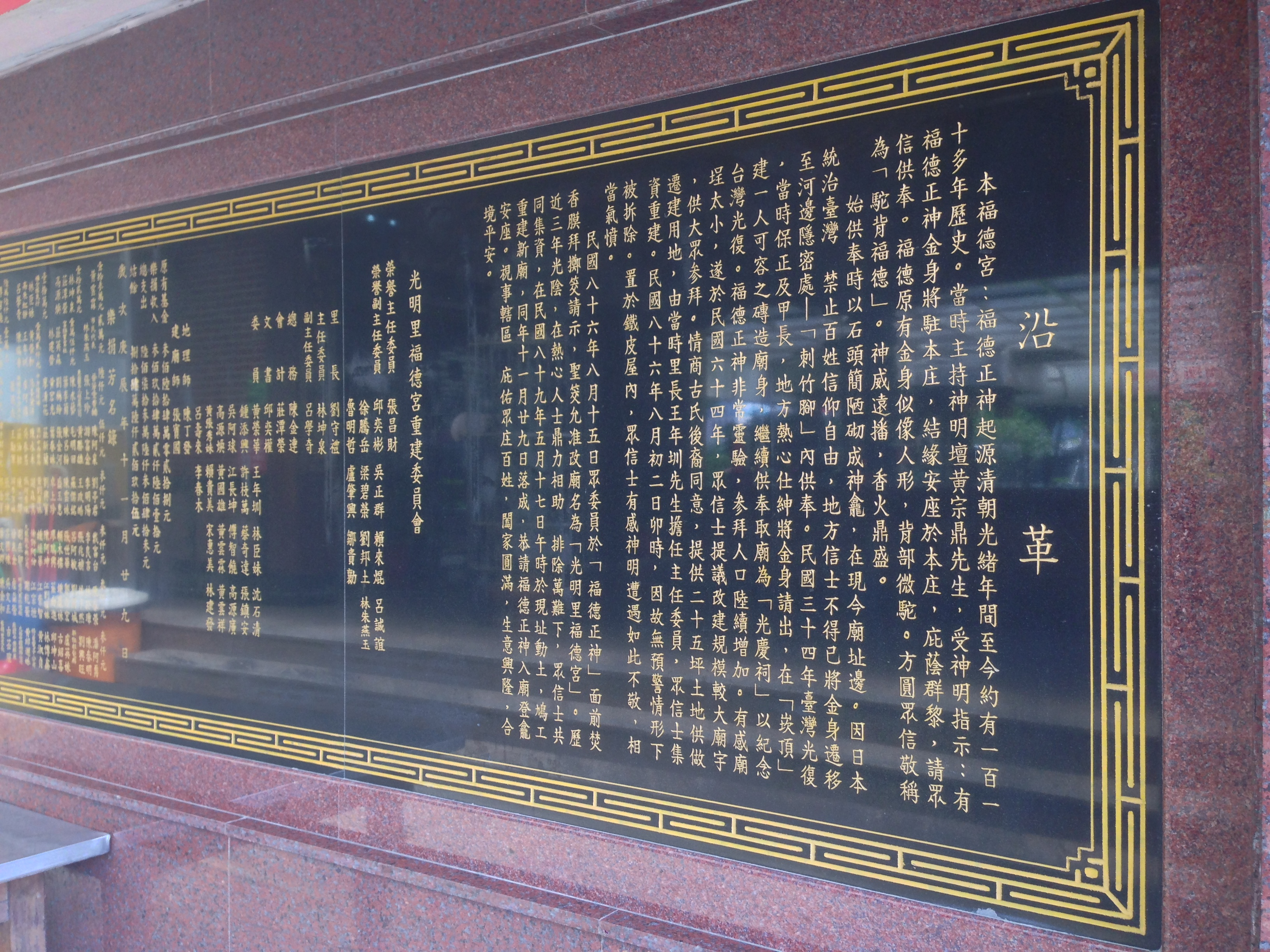 光明里福德祠沿革